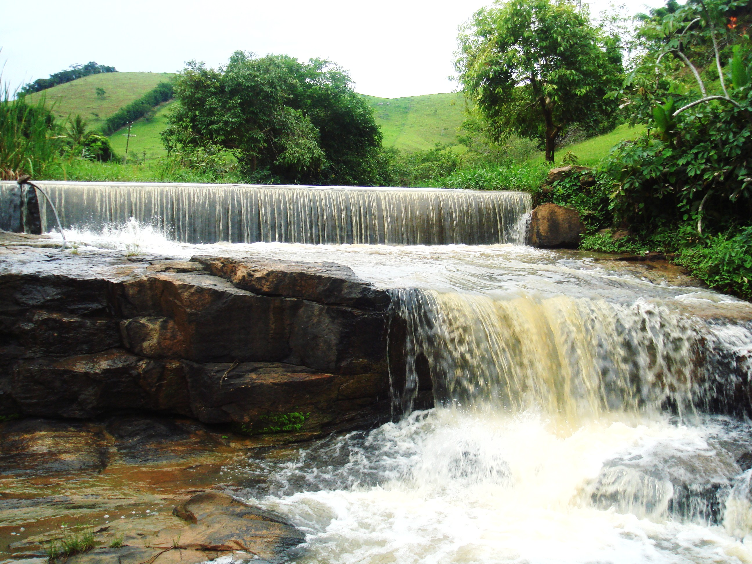 Açude, ponto turístico de Três Irmãos